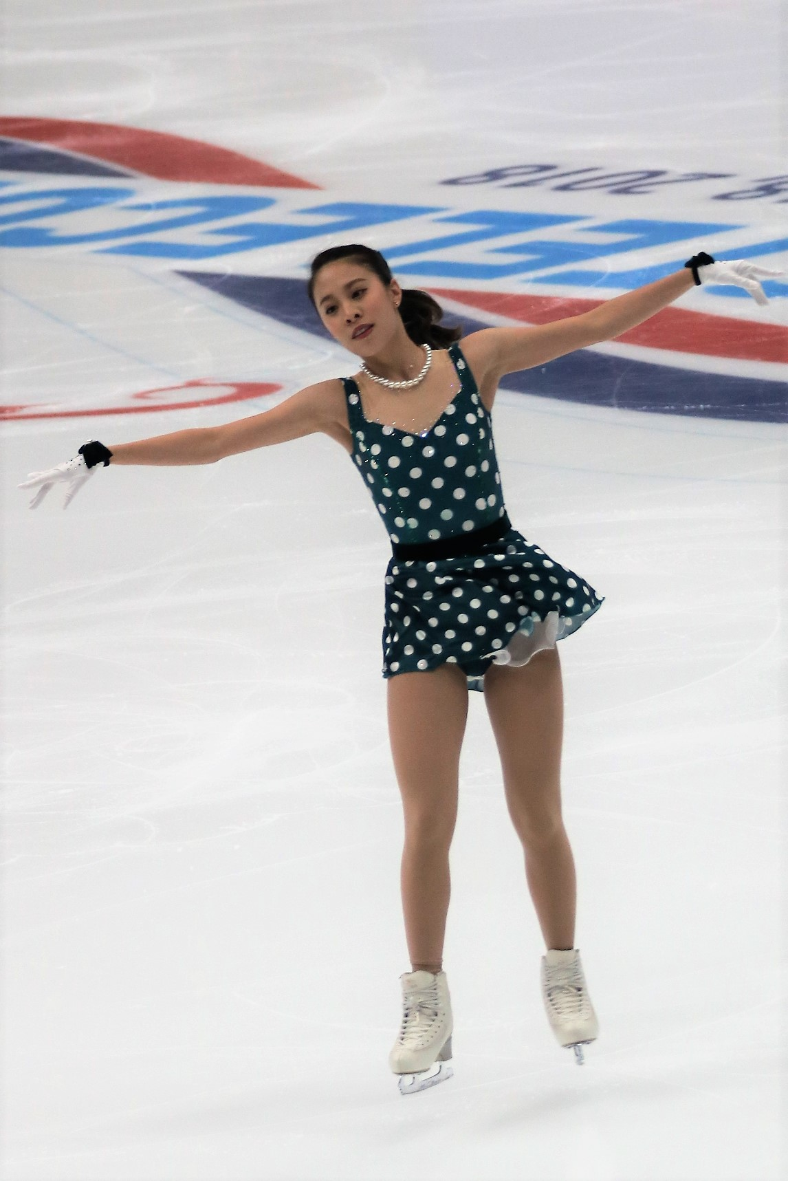 Юра Мацуда (Япония) на Rostelecom Cup 2018